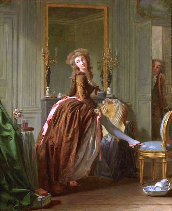 Michel Garnier (1753–1829): Junge Frau bei ihrer Toilette. Öl auf Leinwand. Standort unbekannt.